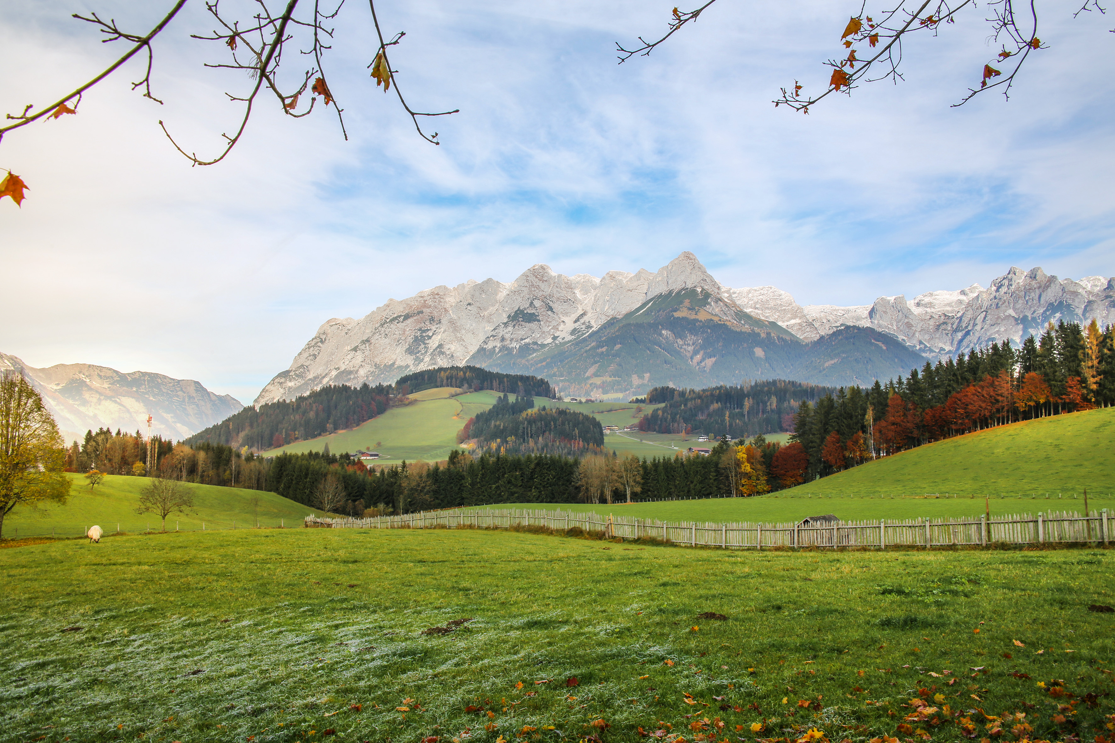 Tennengebirge, vom Buchberg in Bischofshofen aus gesehen